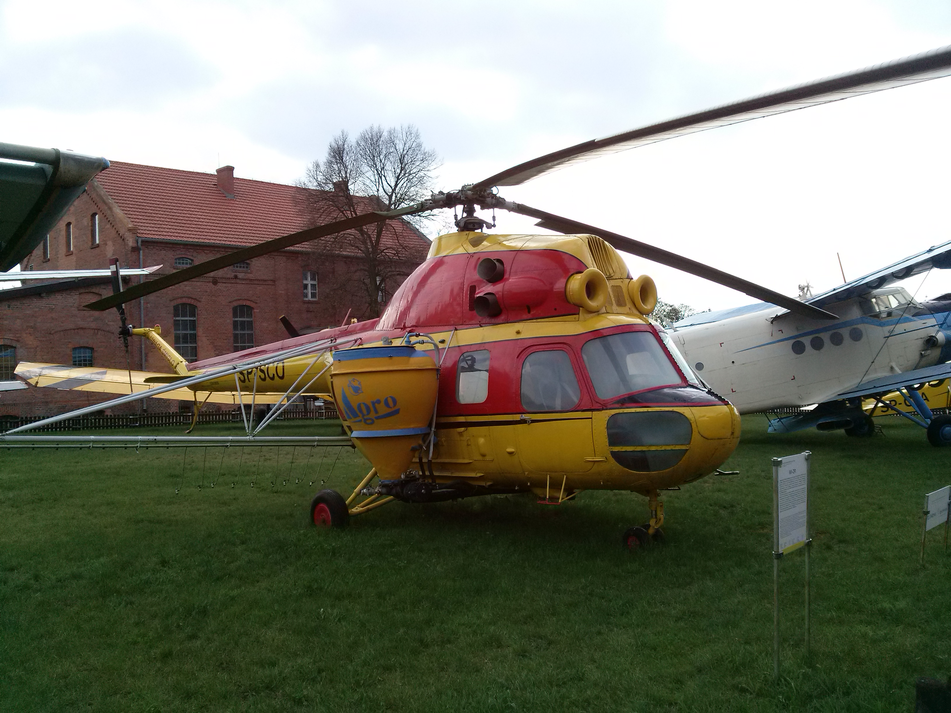 Mi-2 w wersji rolniczej, nieruchomy eksponat w Narodowym Muzeum Rolnictwa w Szreniawie k/Poznania